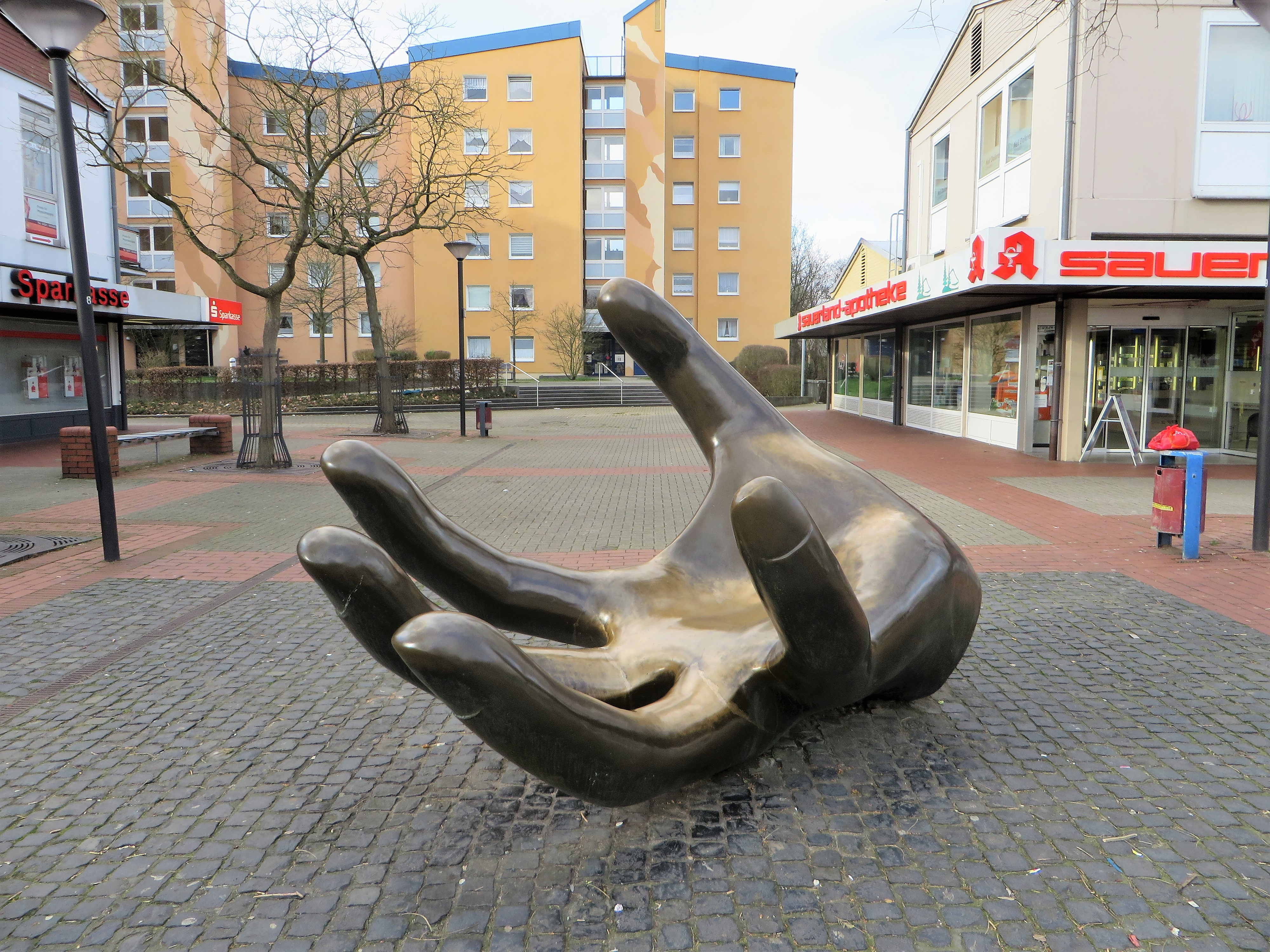 Bronze-Plastik „Geöffnete Hand“ (1,84 m ) auf dem Marktplatz in Hagen-Helfe, zwischen Fröbelstraße und Helfer Straße. Erschaffen 1986 von Elisabeth Altenrichter-Dicke. Kunst im öffentlichen Raum in Hagen.